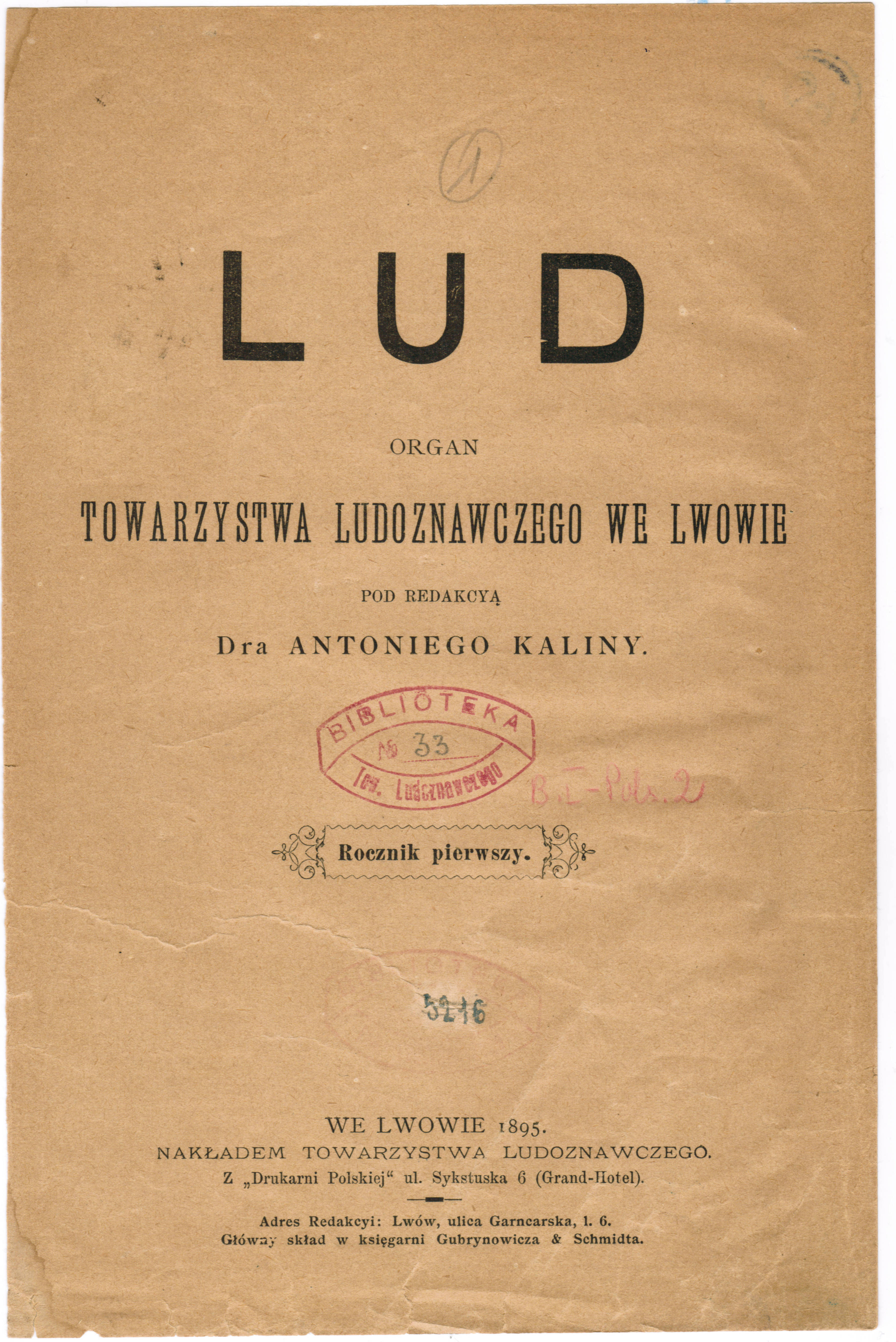 Okładka pierwszego tomu czasopisma naukowego LUD, wydanego we Lwowie w 1895 roku